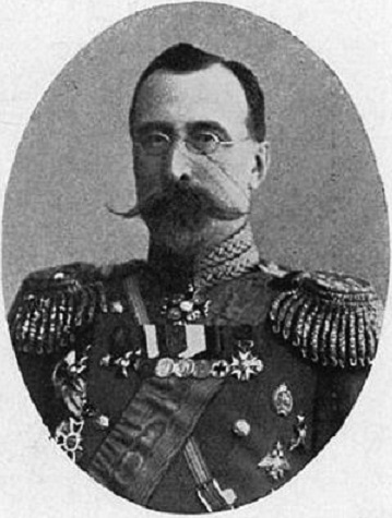 Генерал-лейтенант Сергей Семёнович Хабалов.